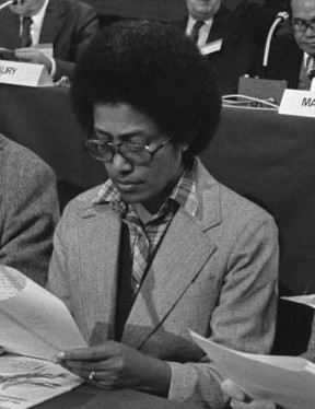 Openbare hoorzitting kernwapens en ontwapening, georganiseerd door de Wereldraad van Kerken in de VU. Van rechts naar links op de voorgrond de jury: (...) mrs. Suliana Siwatibau (Fiji), (...)